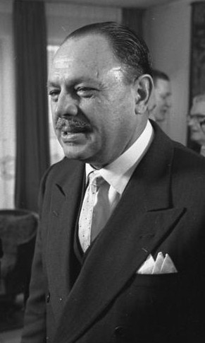 Pakistanischer Staatspräsident Ayoub Khan zu Besuch in Deutschland Essen mit dem bayerischen Ministerpräsidenten Ehard im Hotel Continental (München)